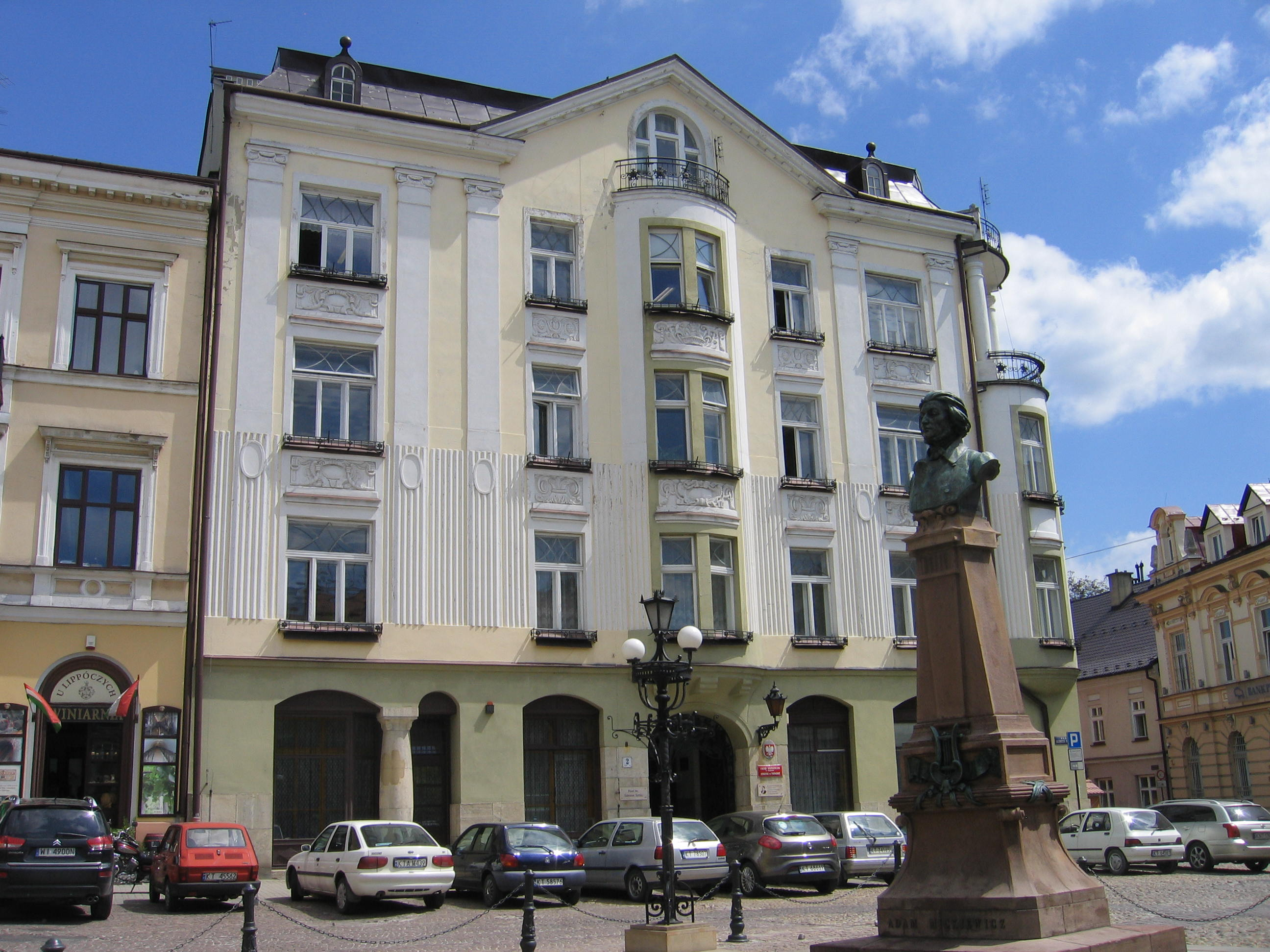 Tarnów, pl. Kazimierza Wielkiego 2 - kamienica (zabytek nr A-362 z 03.11.1993)